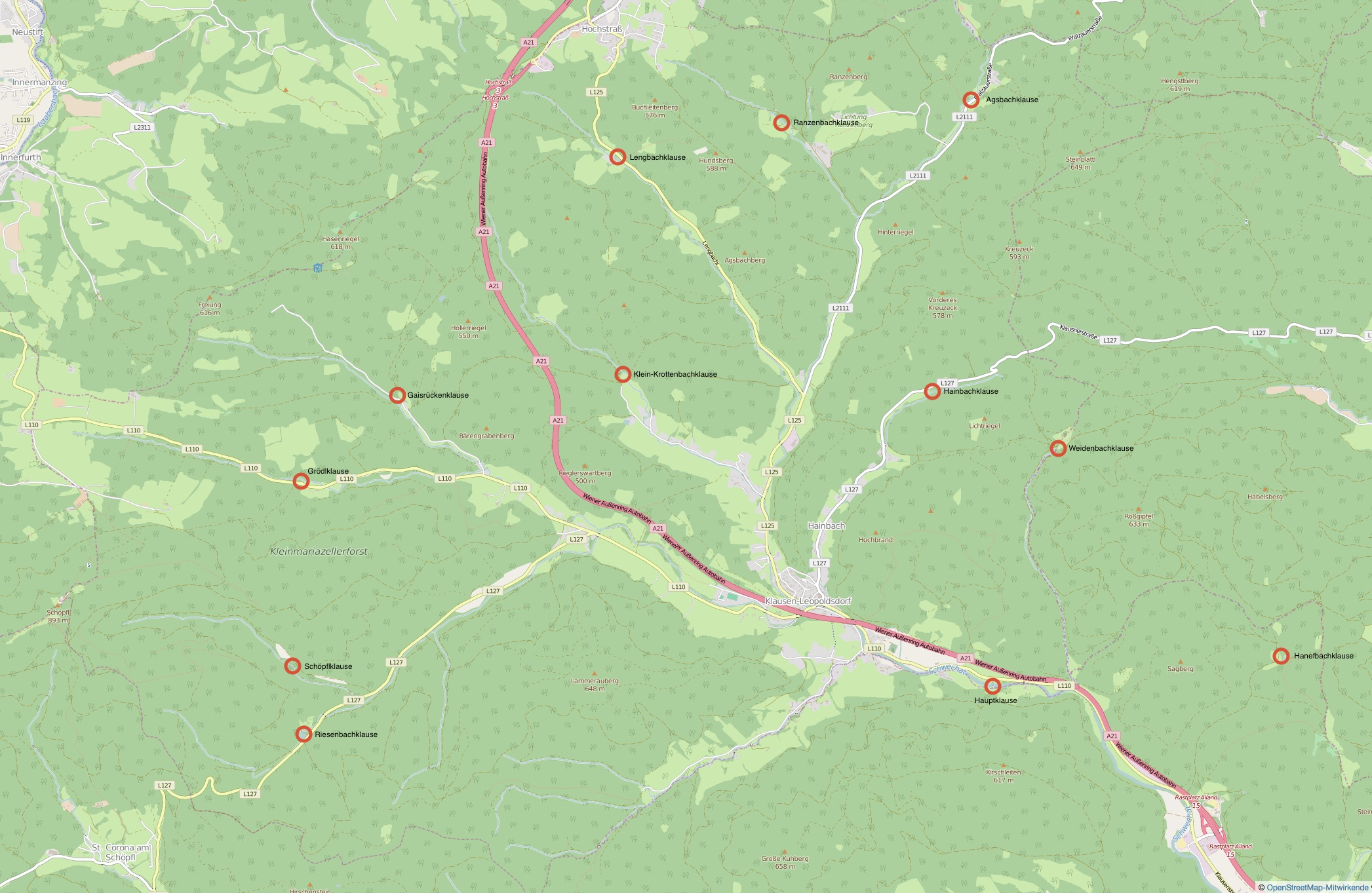 Holztriftanlage Klause-Leopoldsdorf